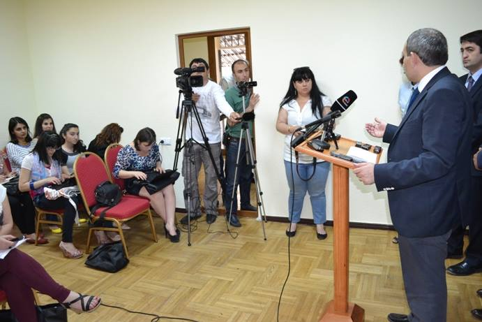 Civil contract (Armenia)